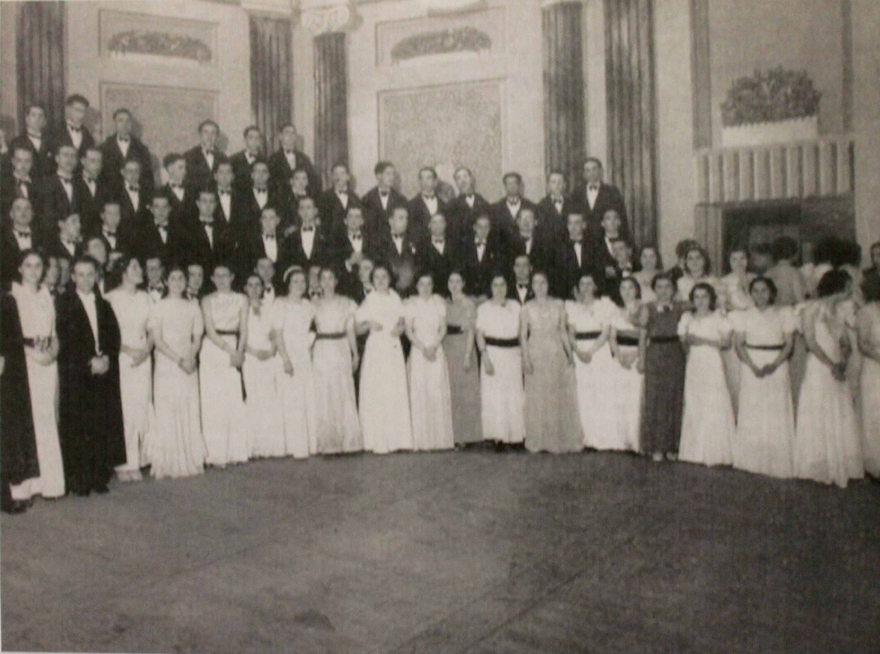 Récita no Rivoli do Orfeão, onde tomam parte naipes femininos. 13.04.1937